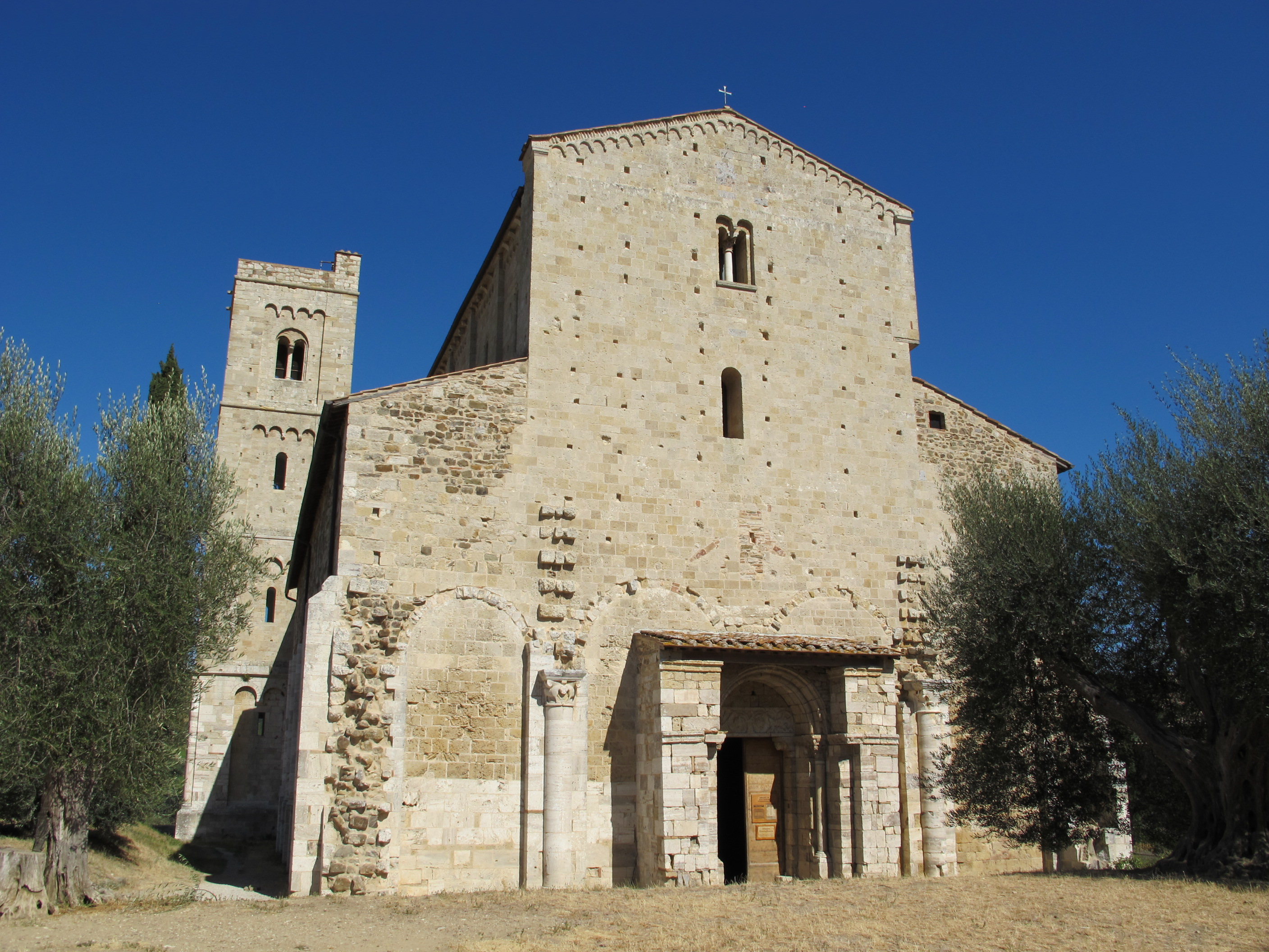 Abbazia di sant'antimo